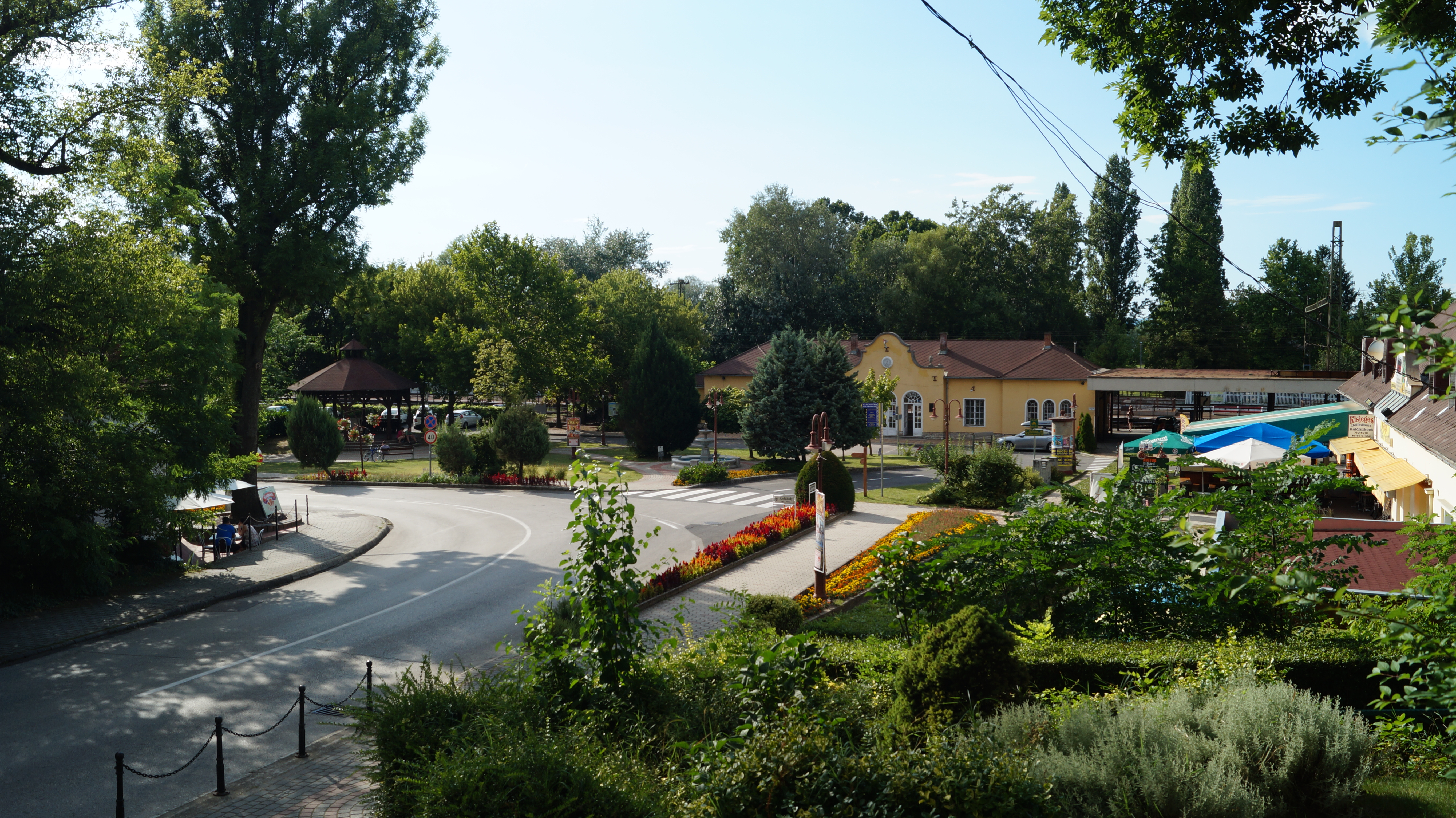 Der Bahnhofsvorplatz im Zentrum von Balatonszemes.